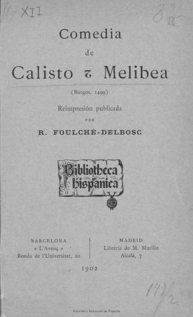 La Celestina Título: Comedia de Calisto y Melibea : (Burgos 1499) Autor: Rojas, Fernando de (ca. 1470-1541) ; Foulché-Delbosc, Raymond (1864-1929) Fecha: (1499) 1902 Datos de edición: Barcelona L'Avenç ; Madrid Librería de M. Murillo Macon Protat Hermanos